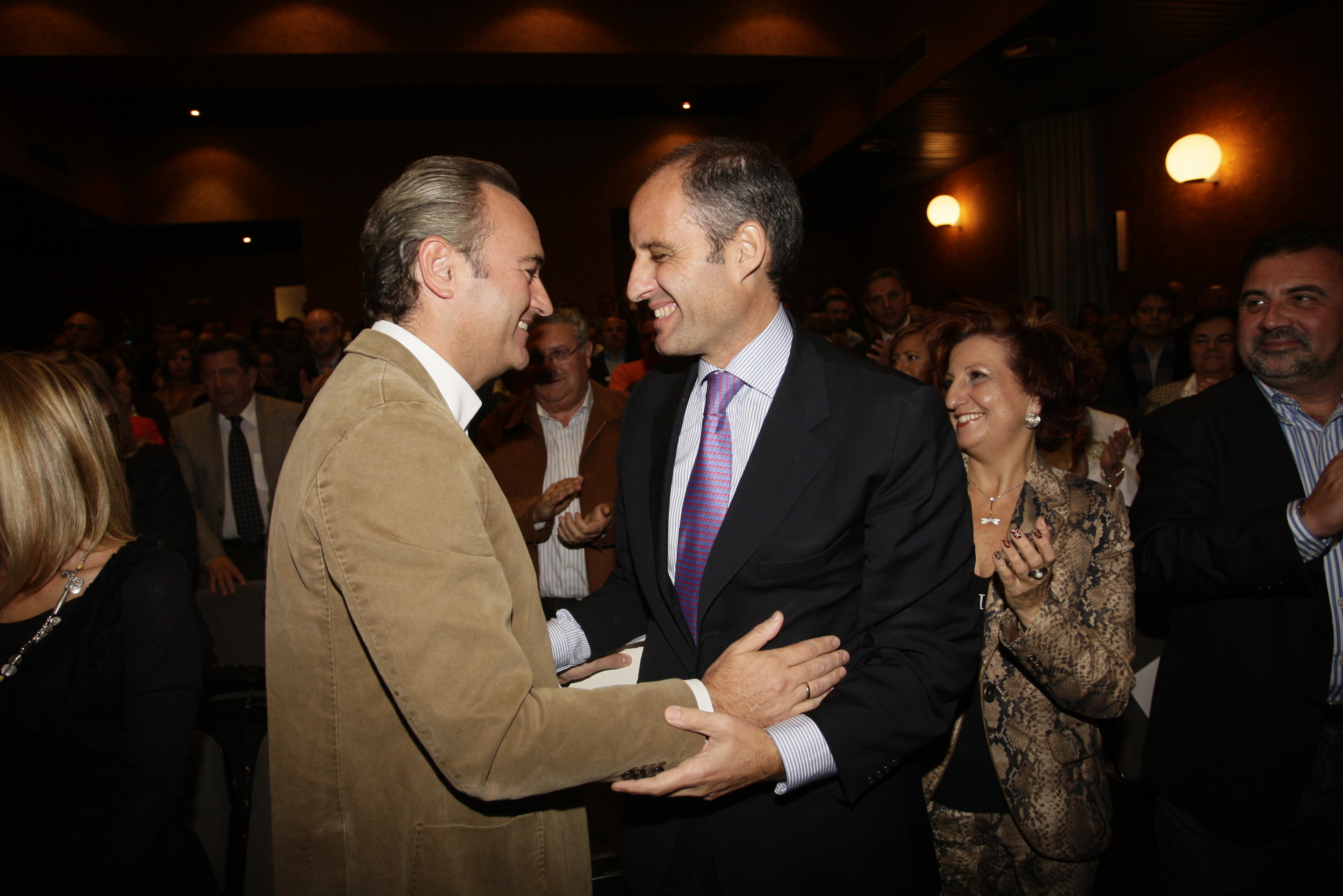 Los presidentes de la Generalitat Alberto Fabra y Francisco Camps